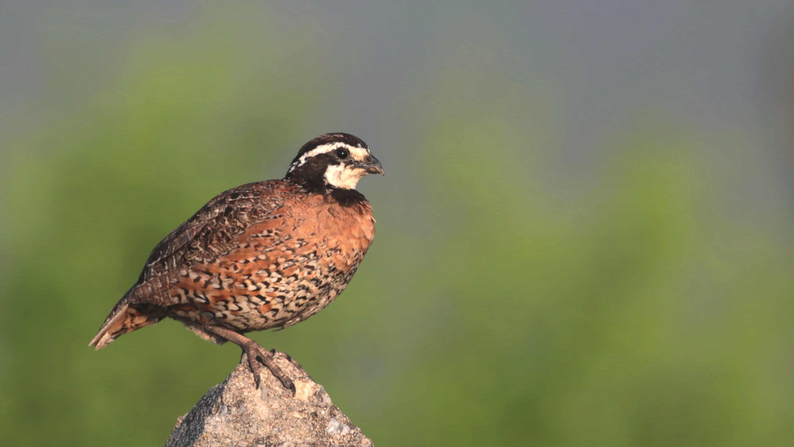 Codorniz Cotuí Norteña